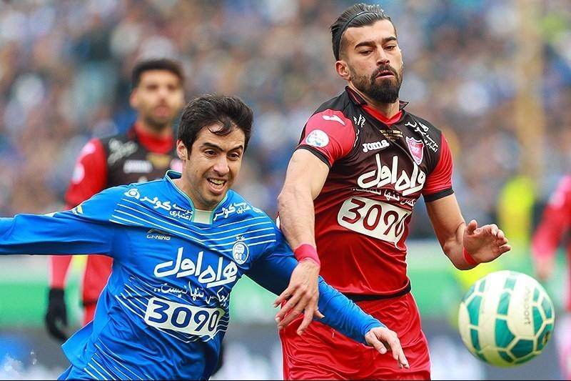 Esteghlal Edges Past Persepolis 3-2 to Claim Tehran Derby - TEHRAN (Tasnim) - The 84th Tehran derby between Iran’s professional football teams Persepolis (Reds) and Esteghlal (Blues) held at Azadi Stadium, west of Tehran, with a 3-2 win for Esteghlal.